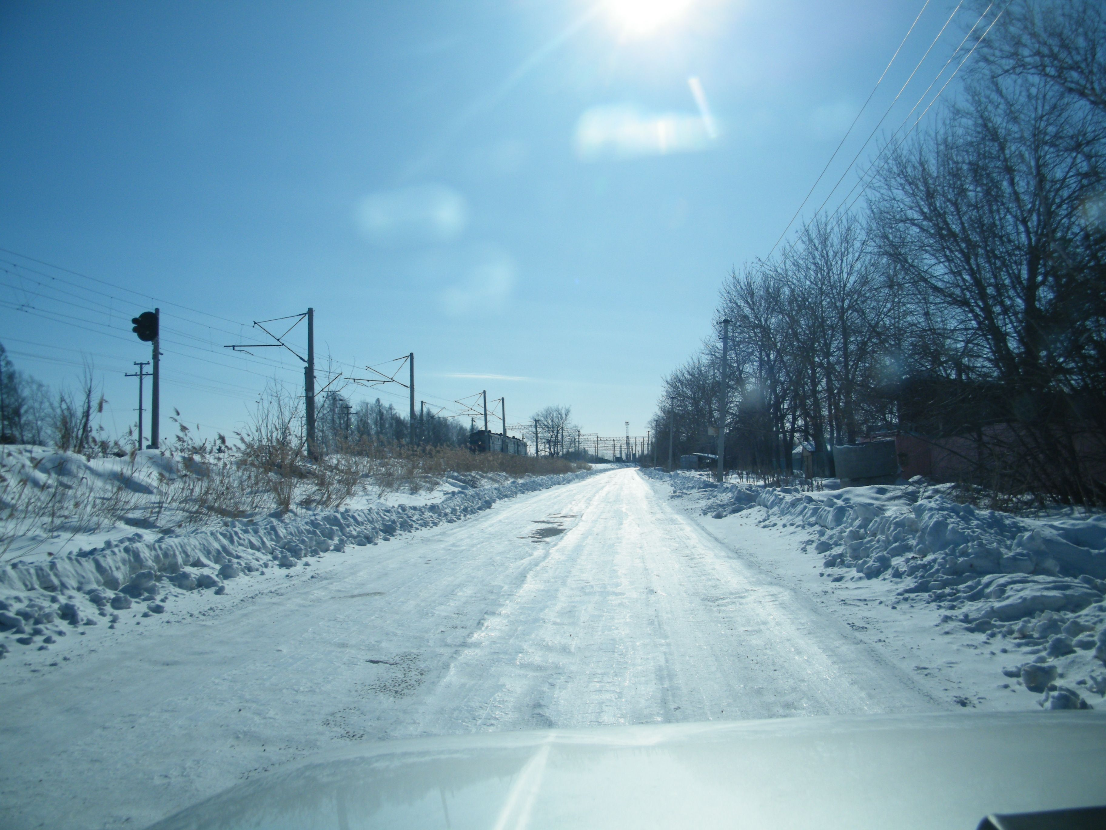 Волочаевка-2 ЕАО